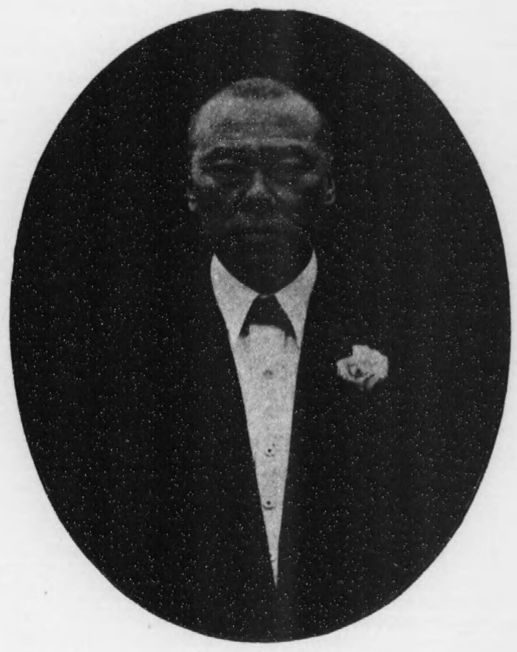 犬上慶五郎（1865～1944）